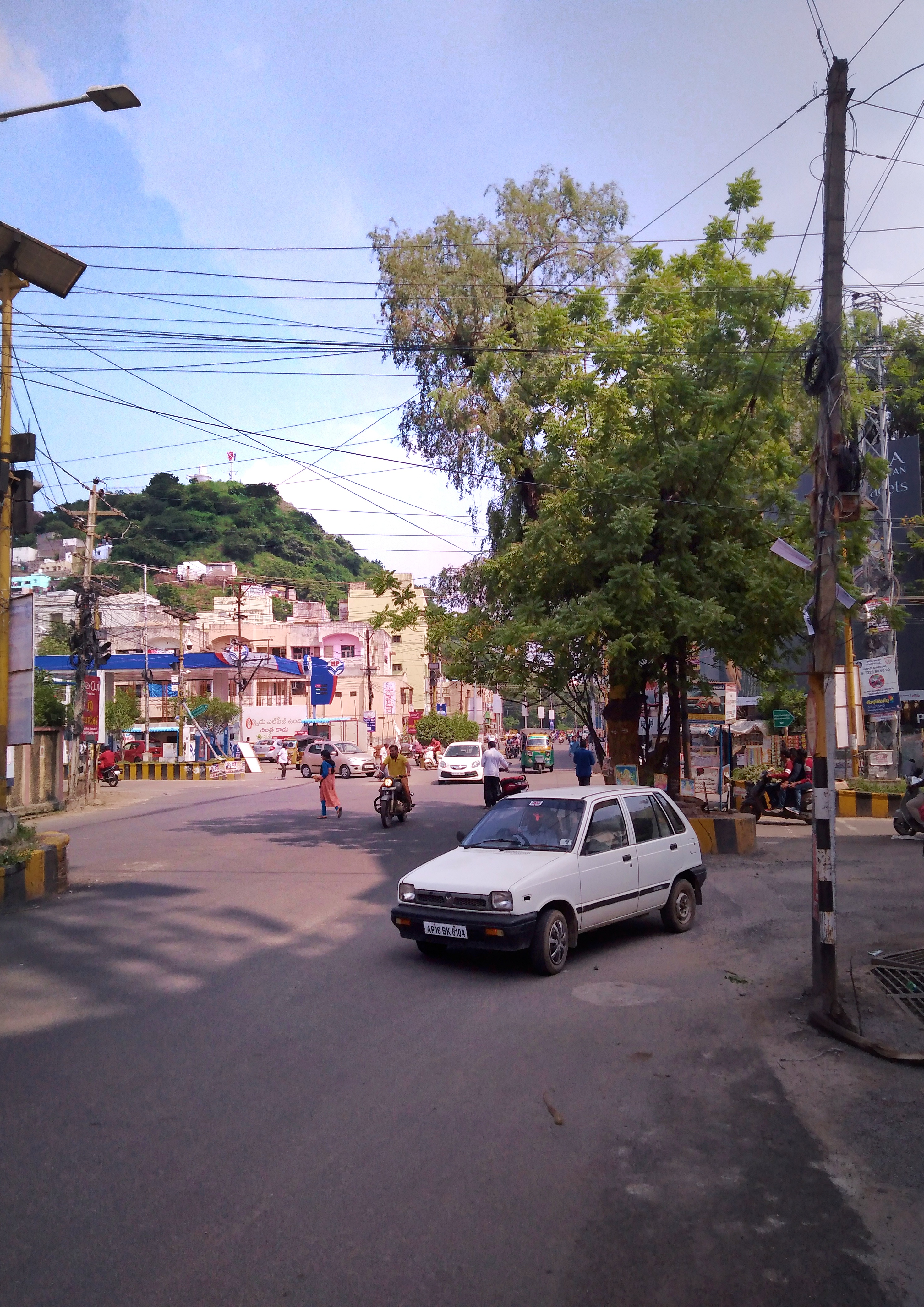 జమ్మిచెట్టు సెంటర్ విజయవాడ